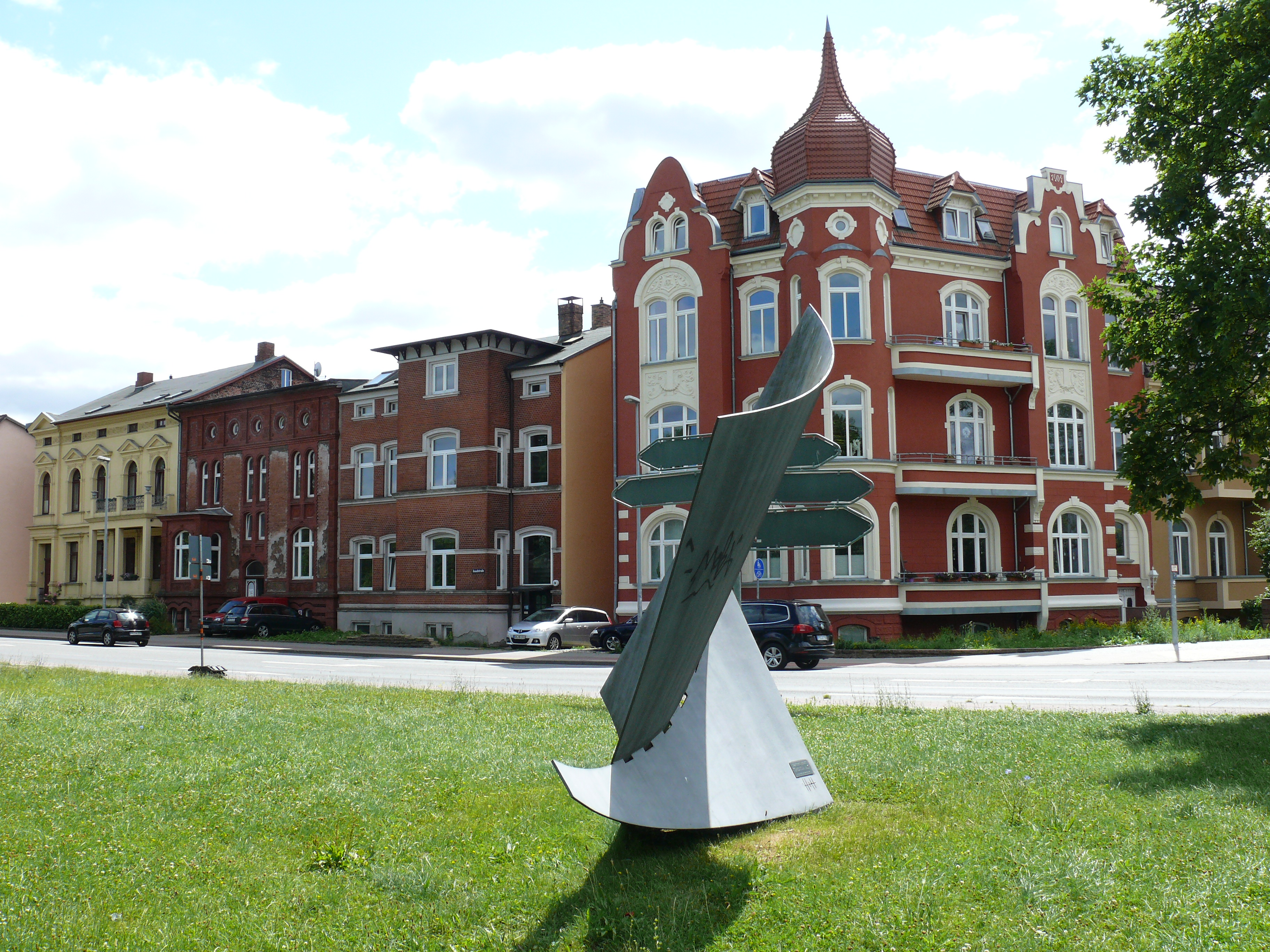 Die Gebäude "Knaudtstraße 24 (ganz links) - 28" und "Schelfstraße 2 (rechts)" in Schwerin.